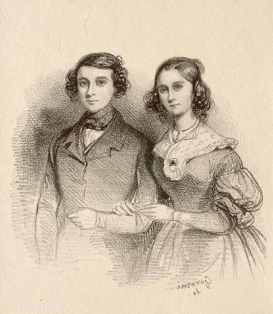 Litographie représentant M. et Mme Emile Taigny